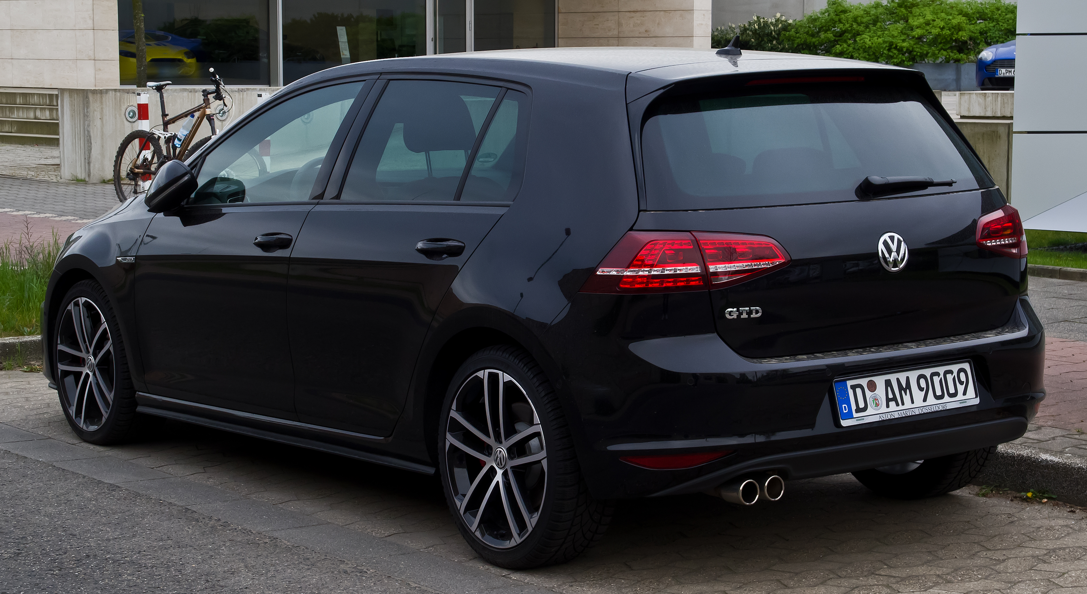 VW Golf GTD (VII)